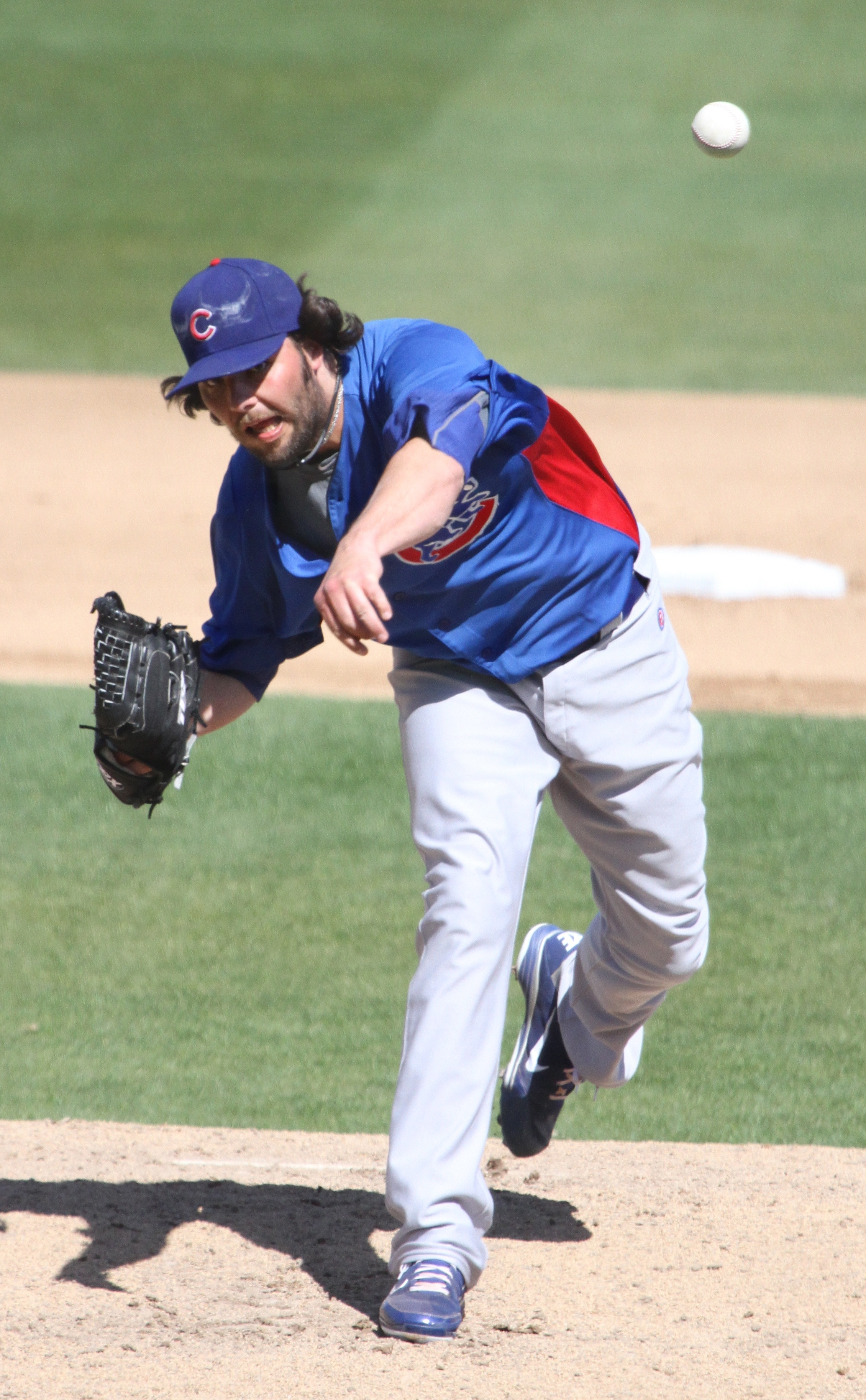 James Russell